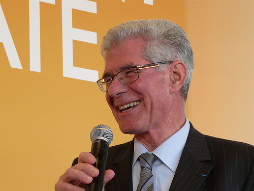 Jean-Marie Beaupuy, député européen MoDem, lors de la Convention européenne du Mouvement Démocrate à Montpeyroux (Puy-de-Dôme), le 9 avril 2009